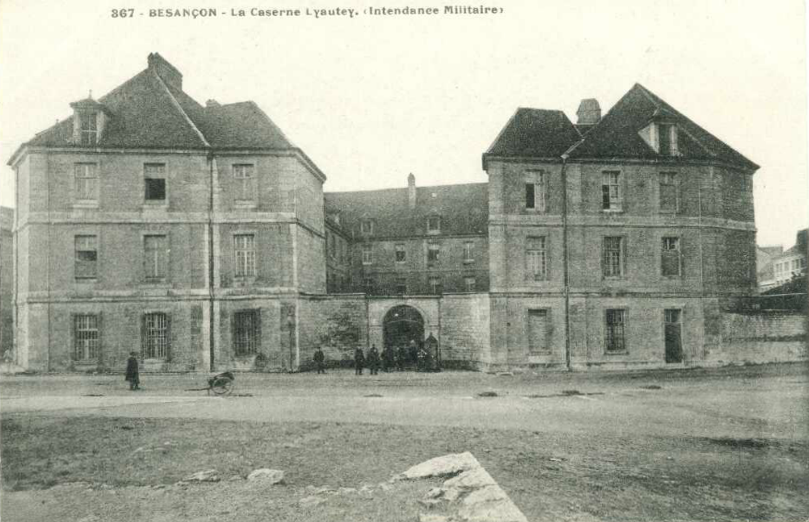 Carte postale ancienne éditée par Gaillard-Prêtre à Besançon, collection "Excursion en Franche-Comté", n°352Besançon : Caserne Lyautey